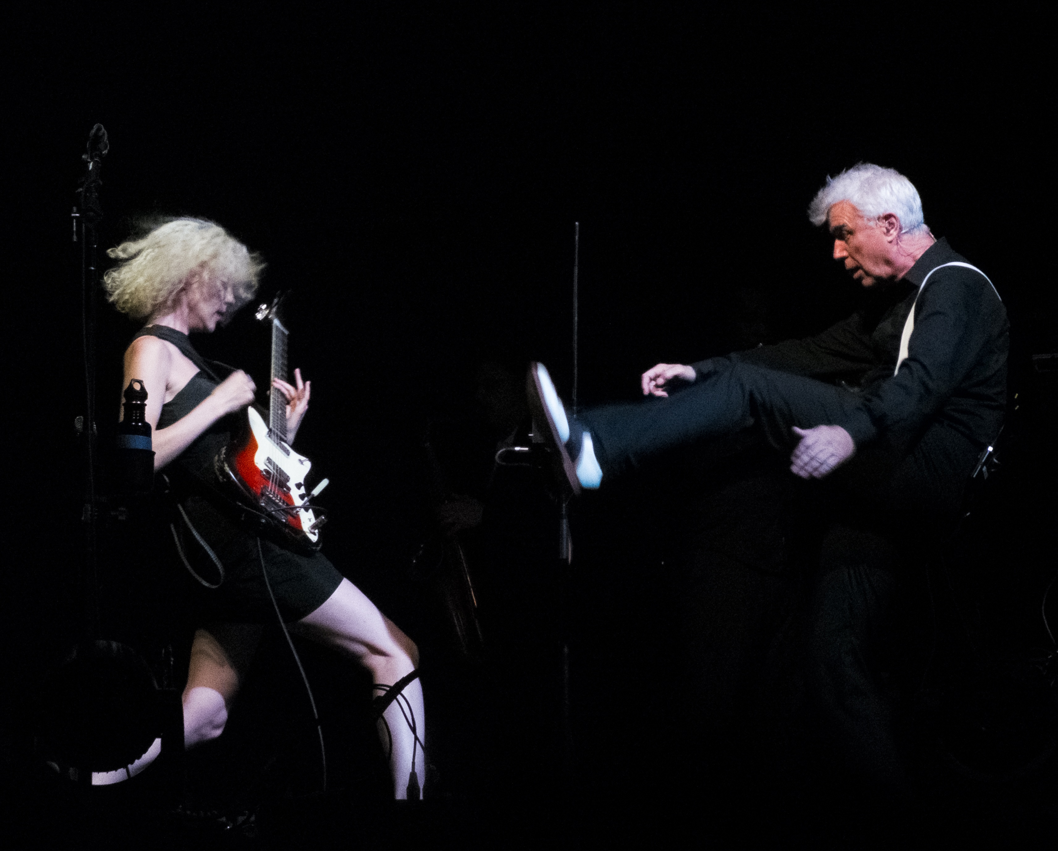 David Byrne & St. Vincent - Gran Teatro Geox, Padova - 10 settembre 2013